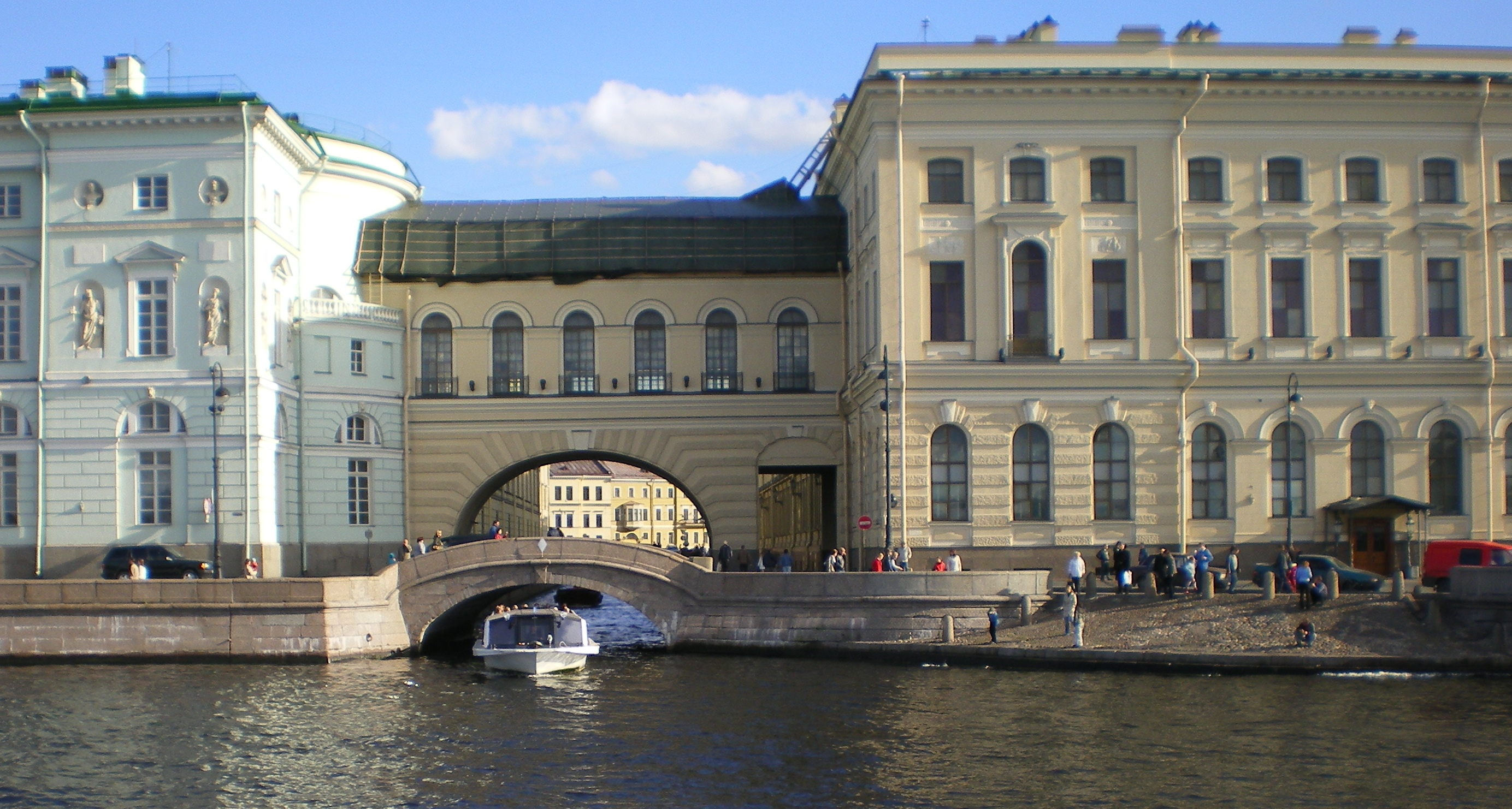 Эрмитажный мост с реки Невы. Просьба не использовать в Gallery.